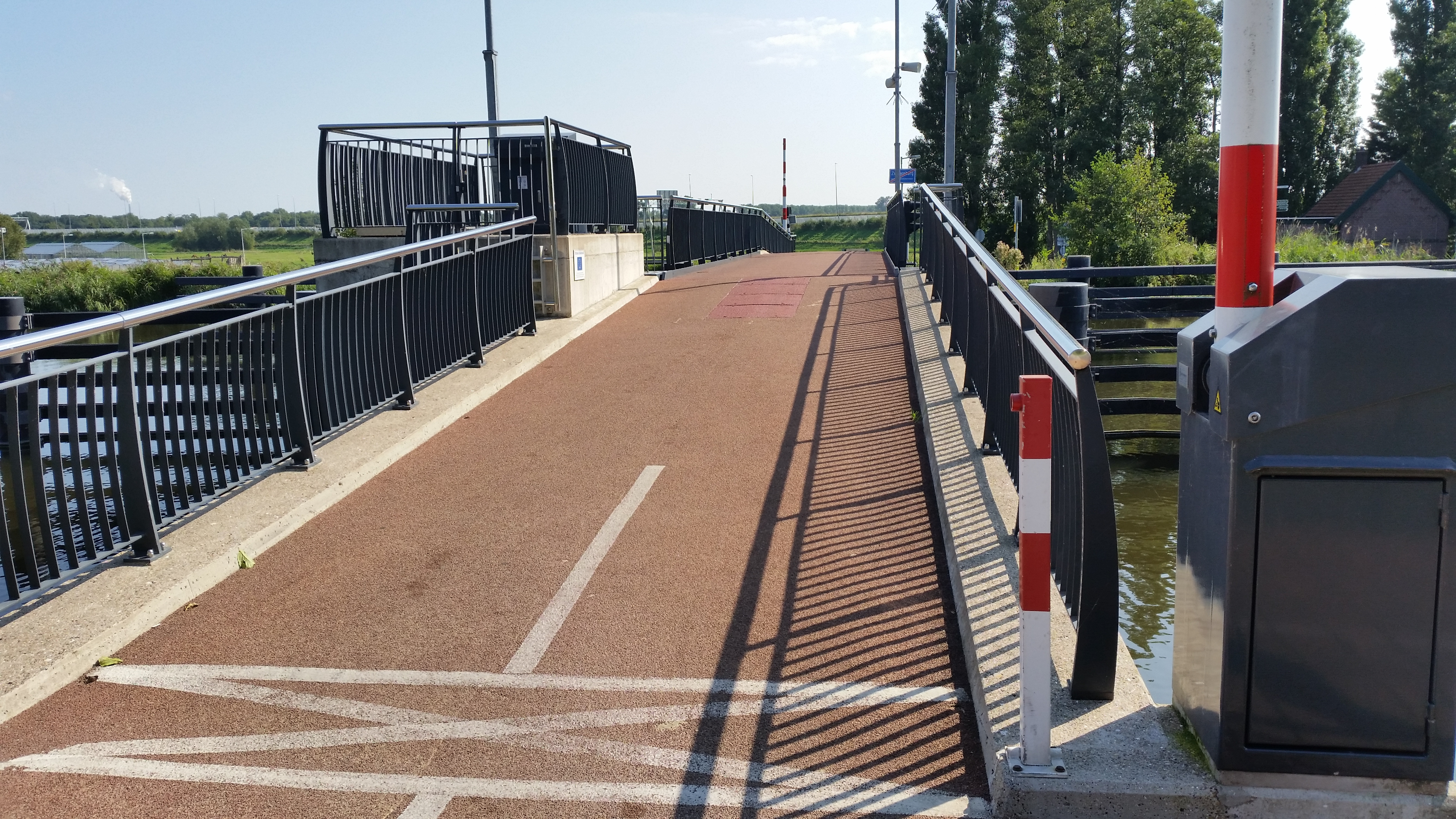 Fietsbrug Zwanenburg, overzicht vanuit westen